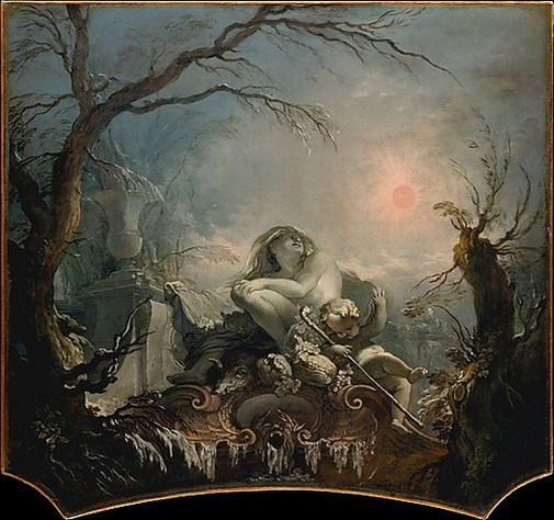 Jacques de La Joue the Younger, Allegory of Winter